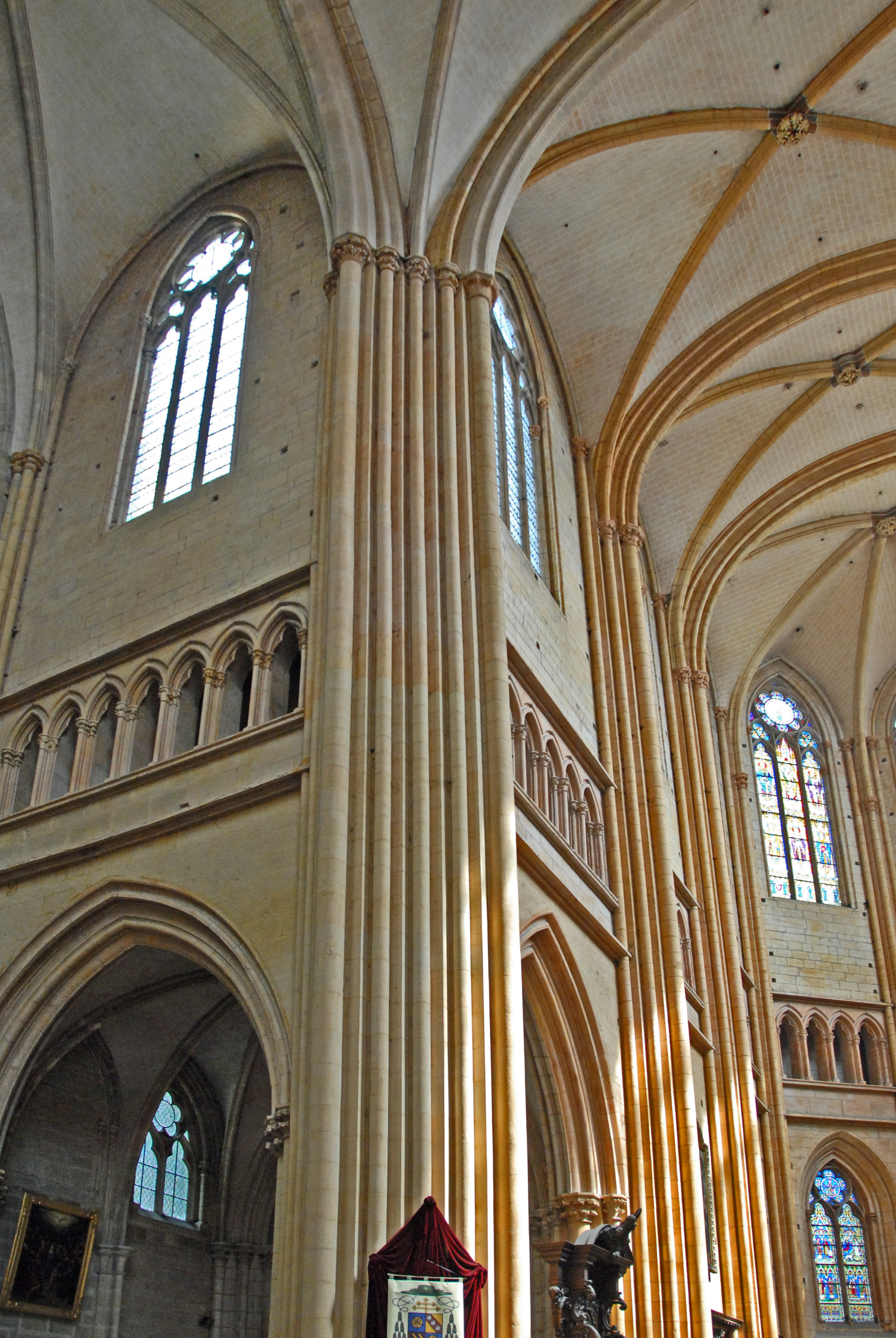 St-Bénigne, Bündelpfeiler Vierung u. Chor